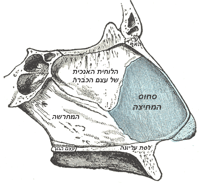 העצמות והסחוס של מחיצת האף, מבט מימין